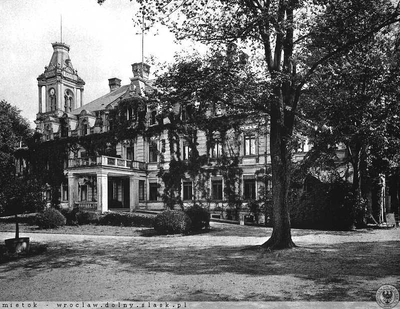 Pałac, mur., 1880, w Stradomii Wierzchniej; data wykonania zdjęcia: ok. 1904.